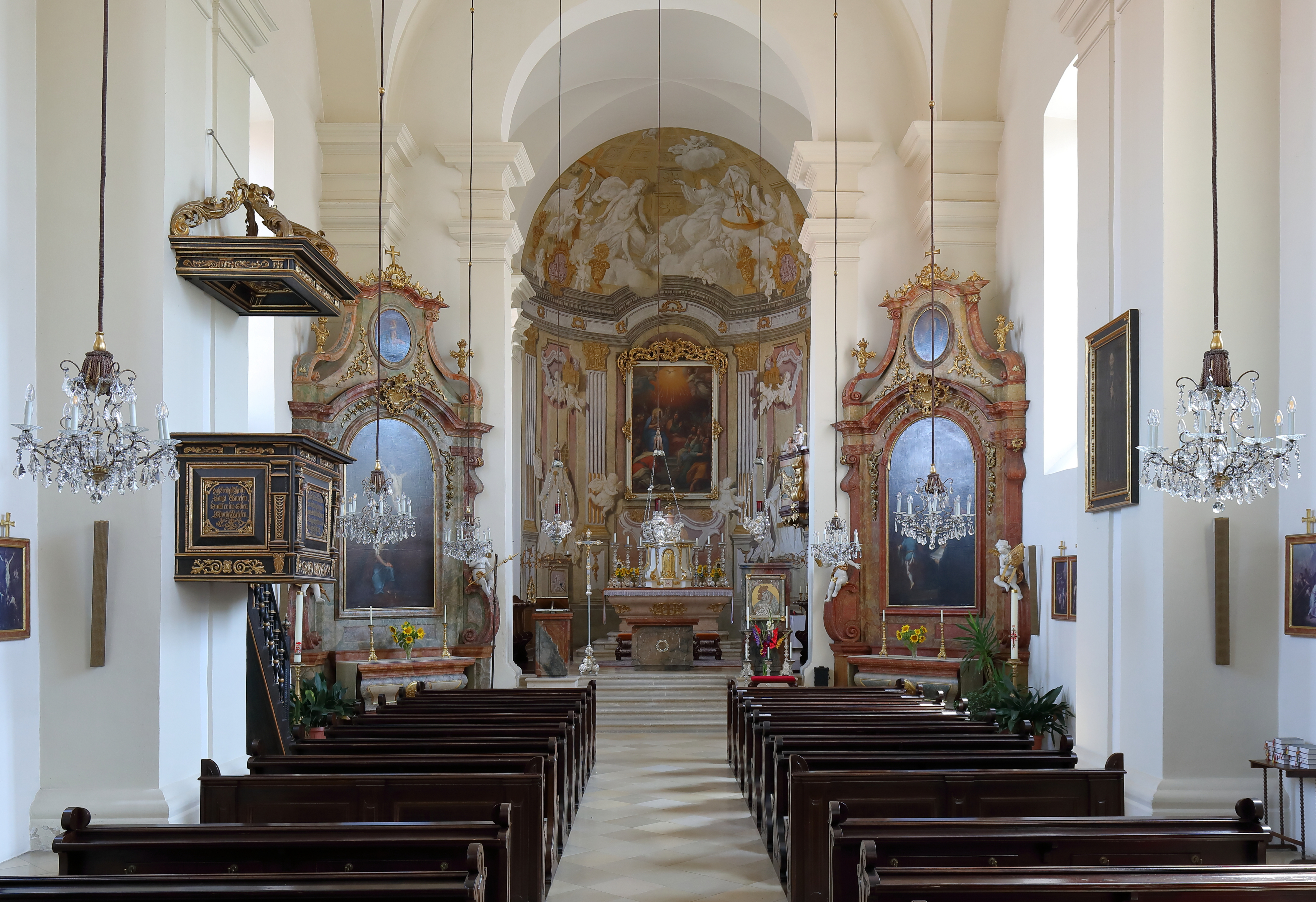 Blick Richtung Hochaltar in der Wallfahrts- und Pfarrkirche Mariä Geburt in Maria Roggendorf, ein Ortsteil der niederösterreichischen Marktgemeinde Wullersdorf.